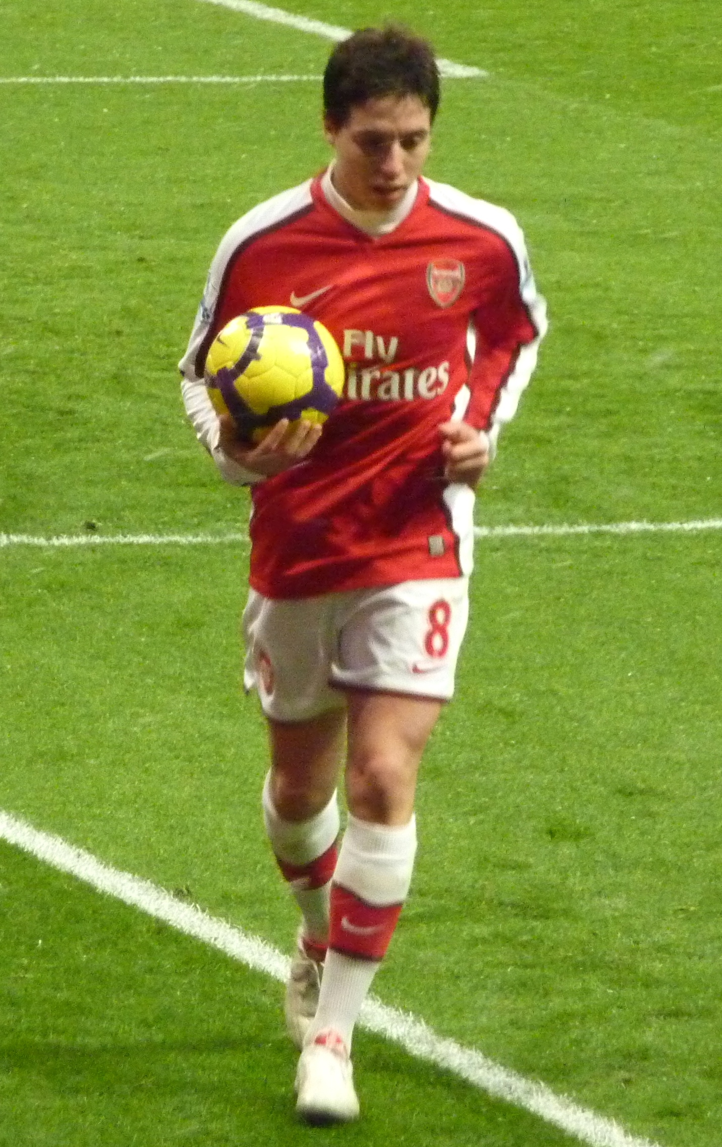 Samir Nasri